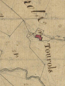 Turol (Orellà) en el Cadastre napoleònic del 1812 (Arxius Departamentals dels Pirineus Orientals)